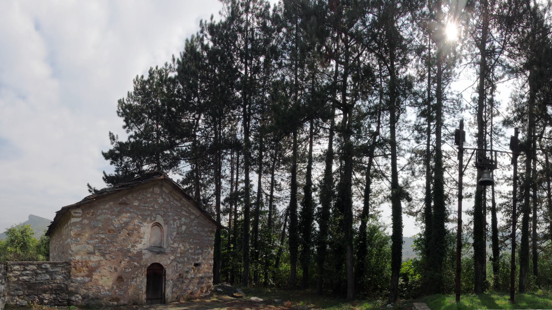 Църквата "Св. Йоан Кръстител" - Върбово